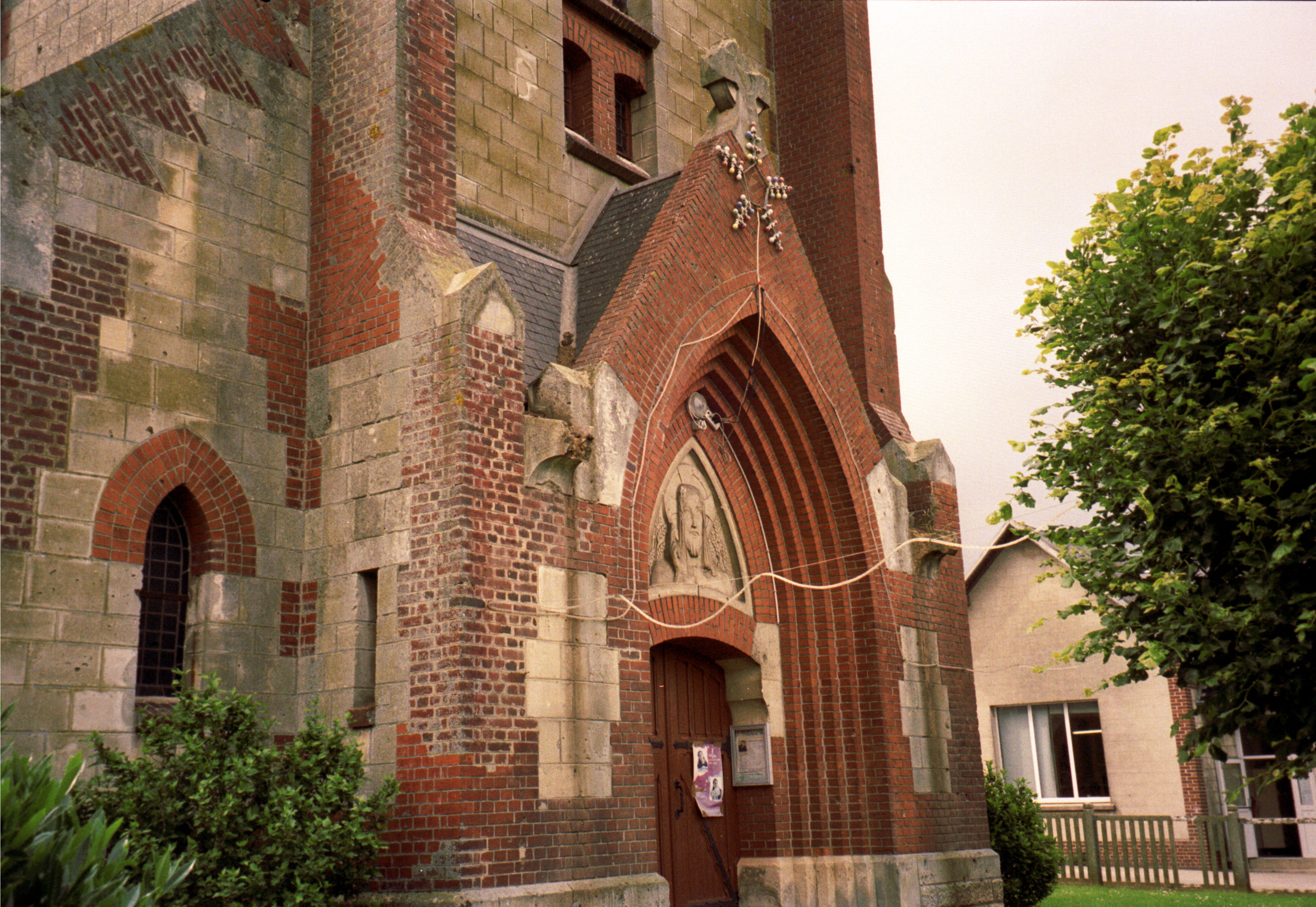 Entrance of the church in Assevillers, Somme Department, Picardie Region, France